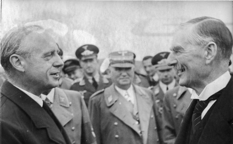 Zentralbild Münchener Abkommen 29. September 1938 Der britische Premierminister N. Chamberlain verabschiedet sich vom Reichsaußenminister J. von Ribbentrop am 30.9.1938.